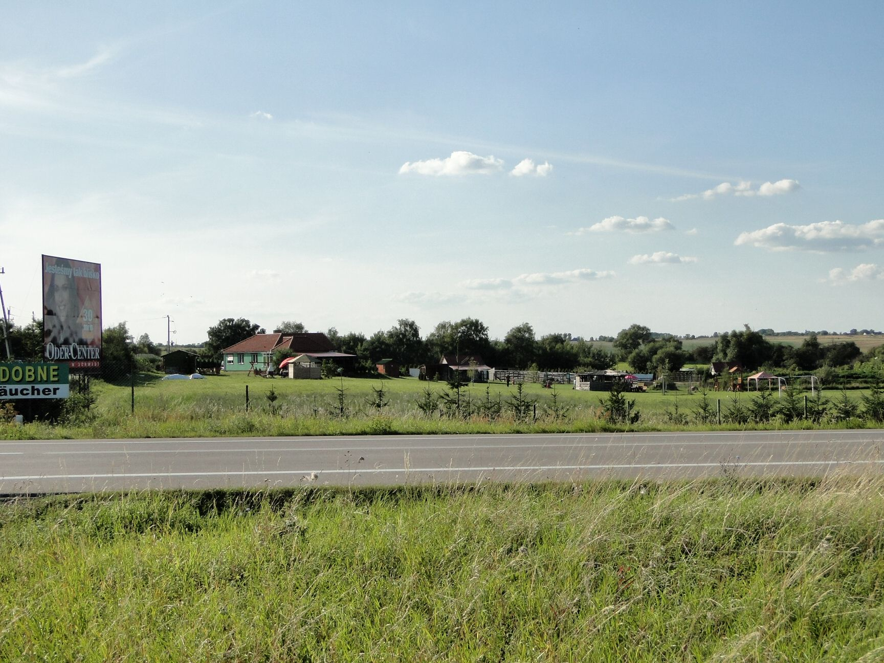 Smętowice